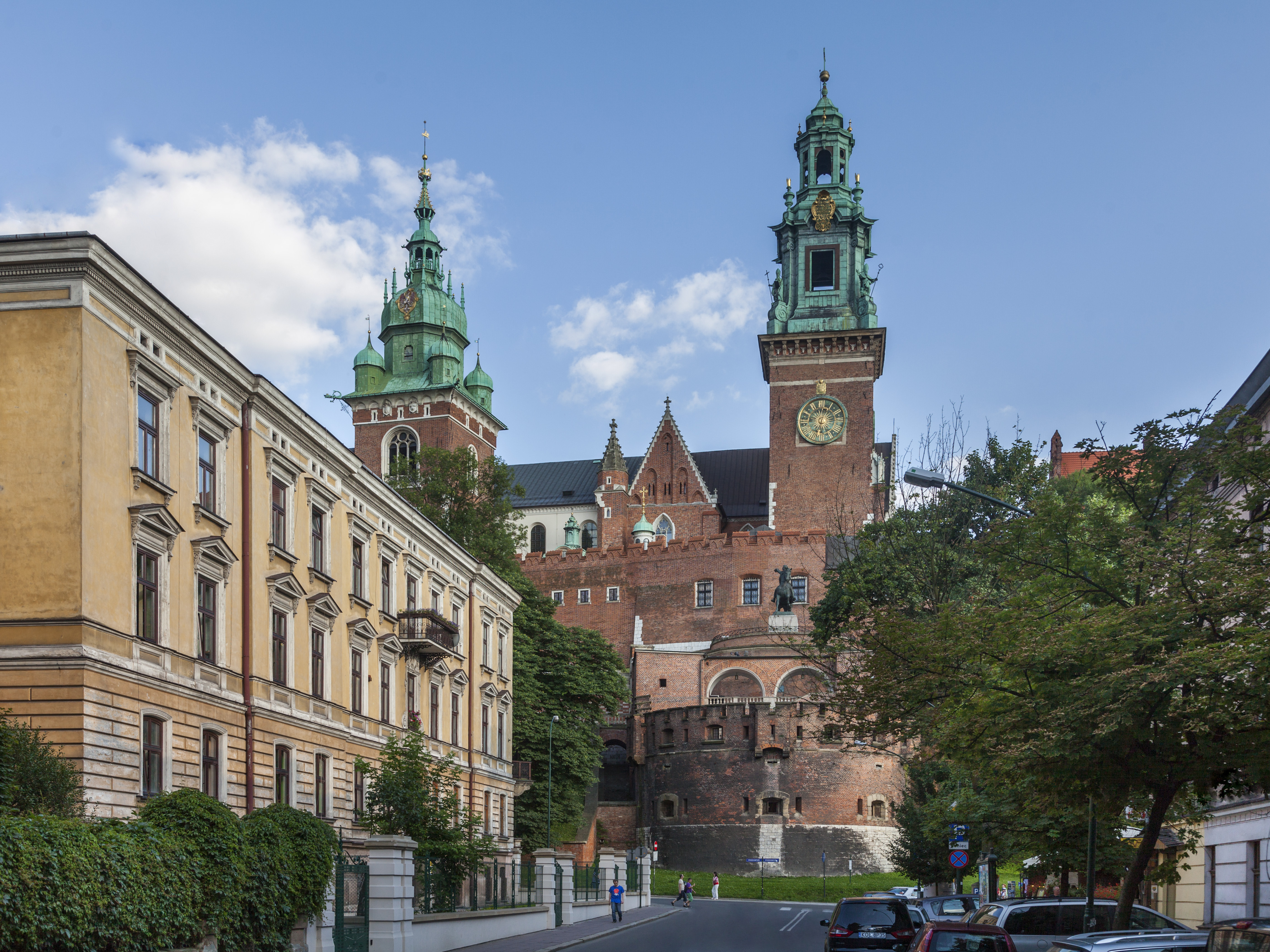 Widok na Wzgórze Wawelskie w Krakowie od strony północnej, z ul. Straszewskiego. Północna elewacja katedry i nowożytne obwarowania Wawelu.